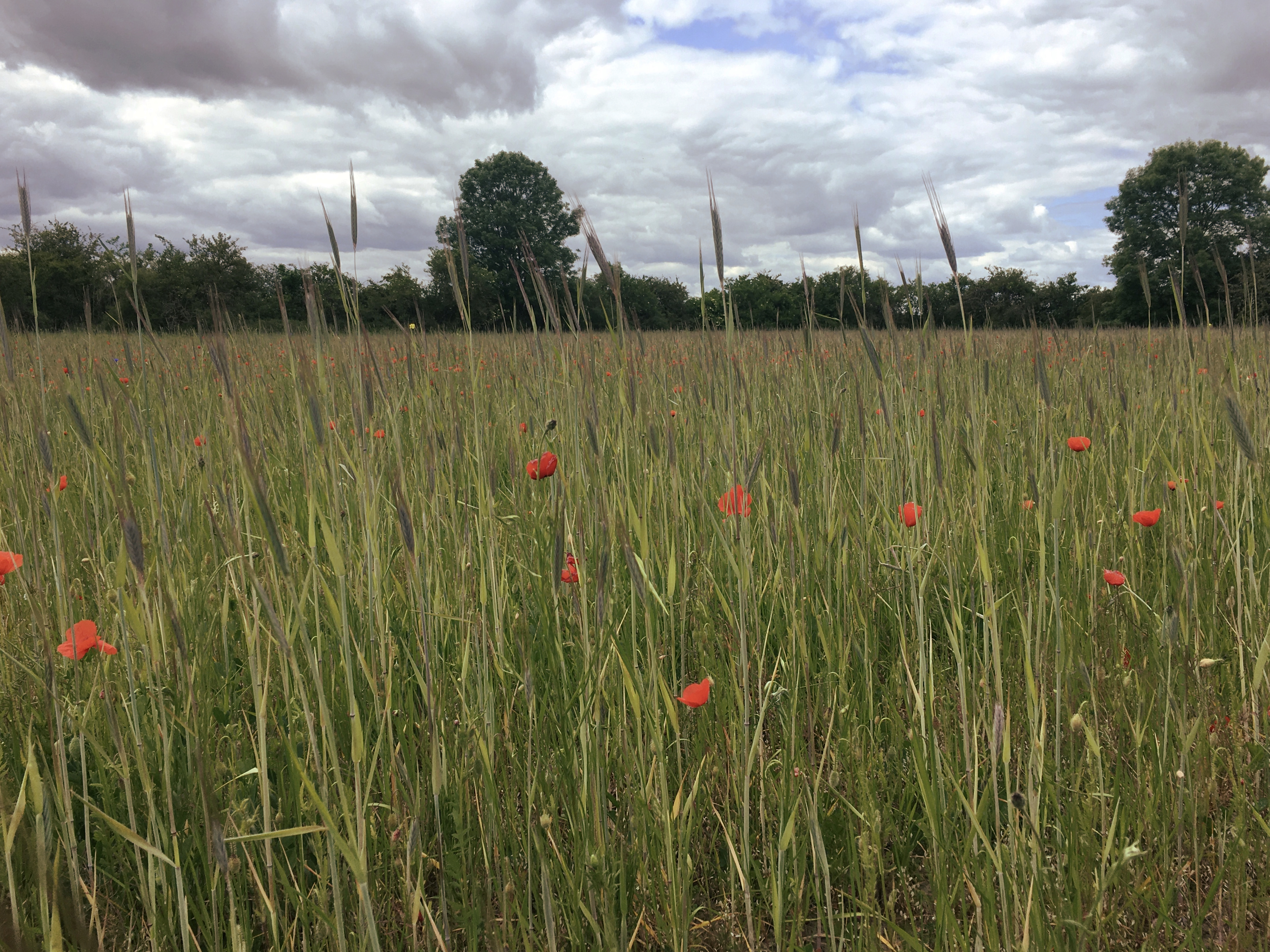 Akker met akkeronkruiden in Cortenoever, Nederland